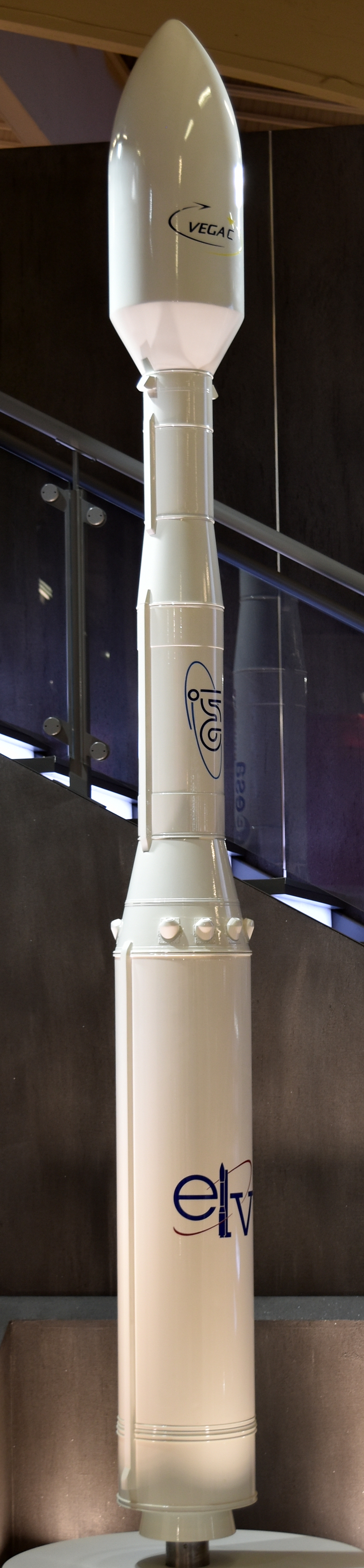 Maquette lanceur léger Vega C , Salon du Bourget 2015